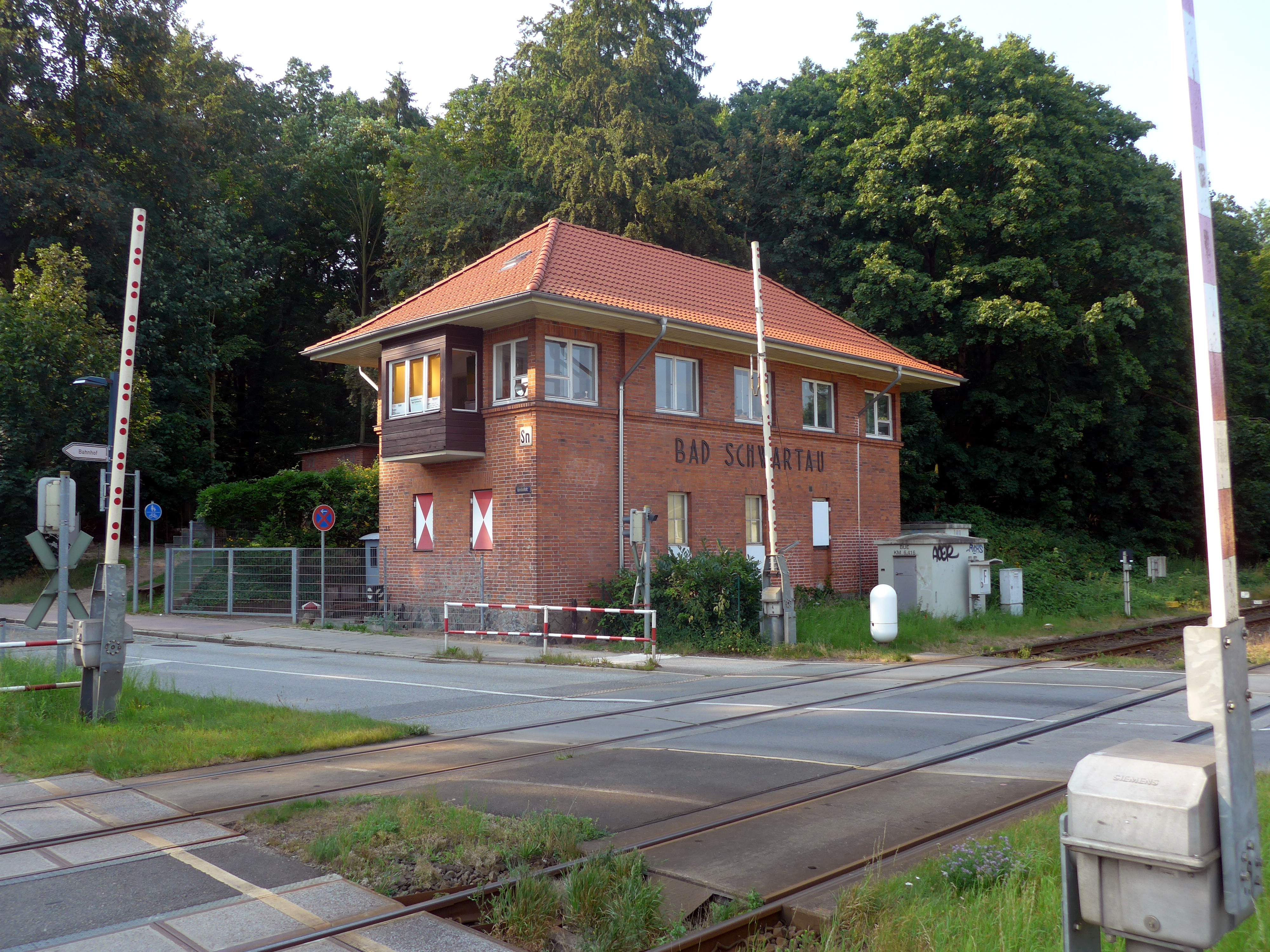 Stellwerk "Sn" in Bad Schwartau, Geibelstraße 13, Ansicht aus Richtung Nikolausstraße